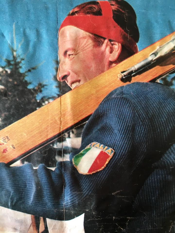 Albino Alverà, foto del post-allenamento con la Nazionale Italiana di sci.